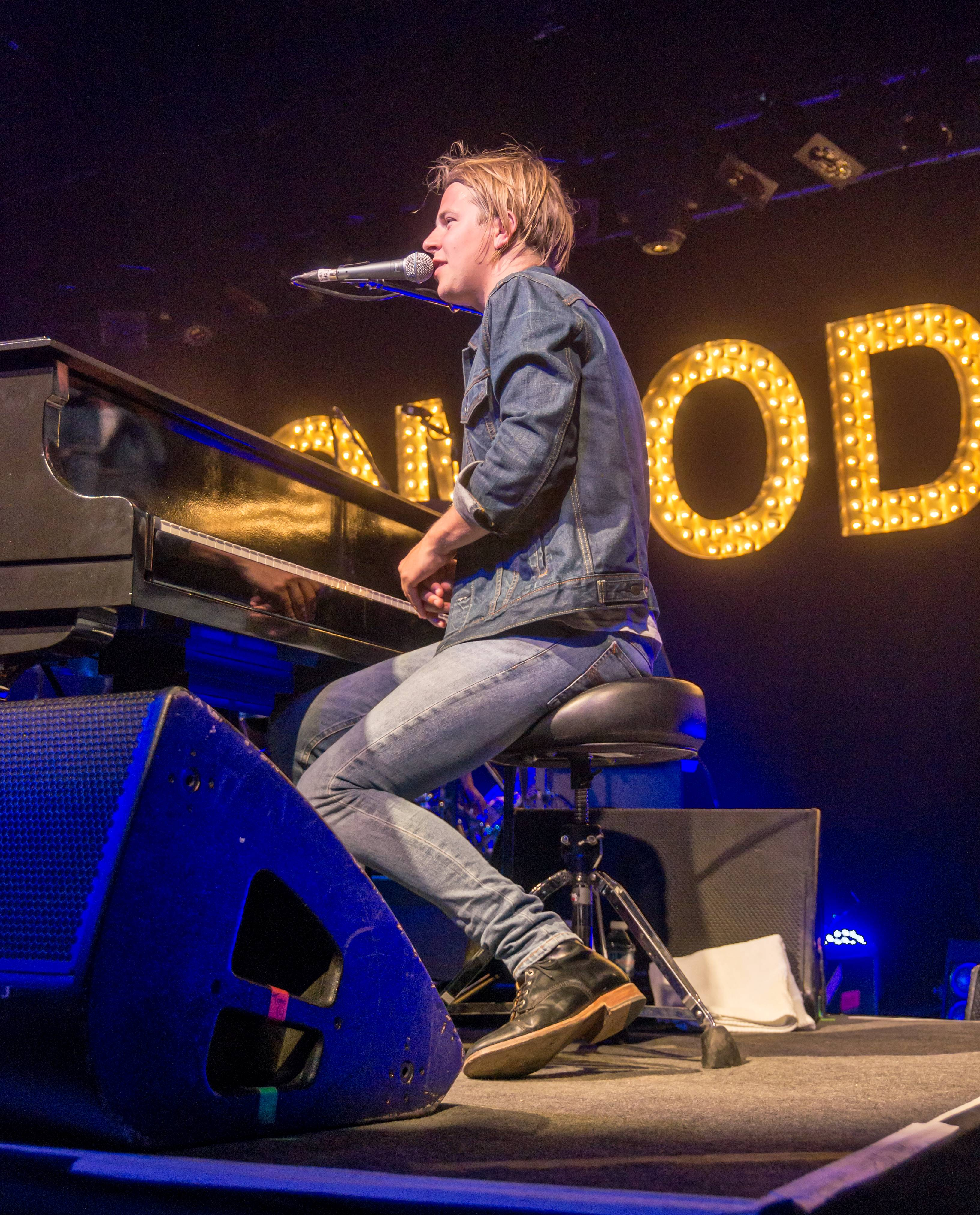 Bilder vom ZMF 2015 Tom Odell 16. Juli 2015